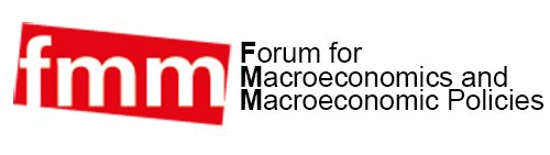 Logo FMM